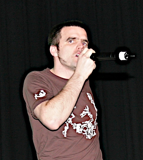 Aslak Borgersrud, Gatas Parlament